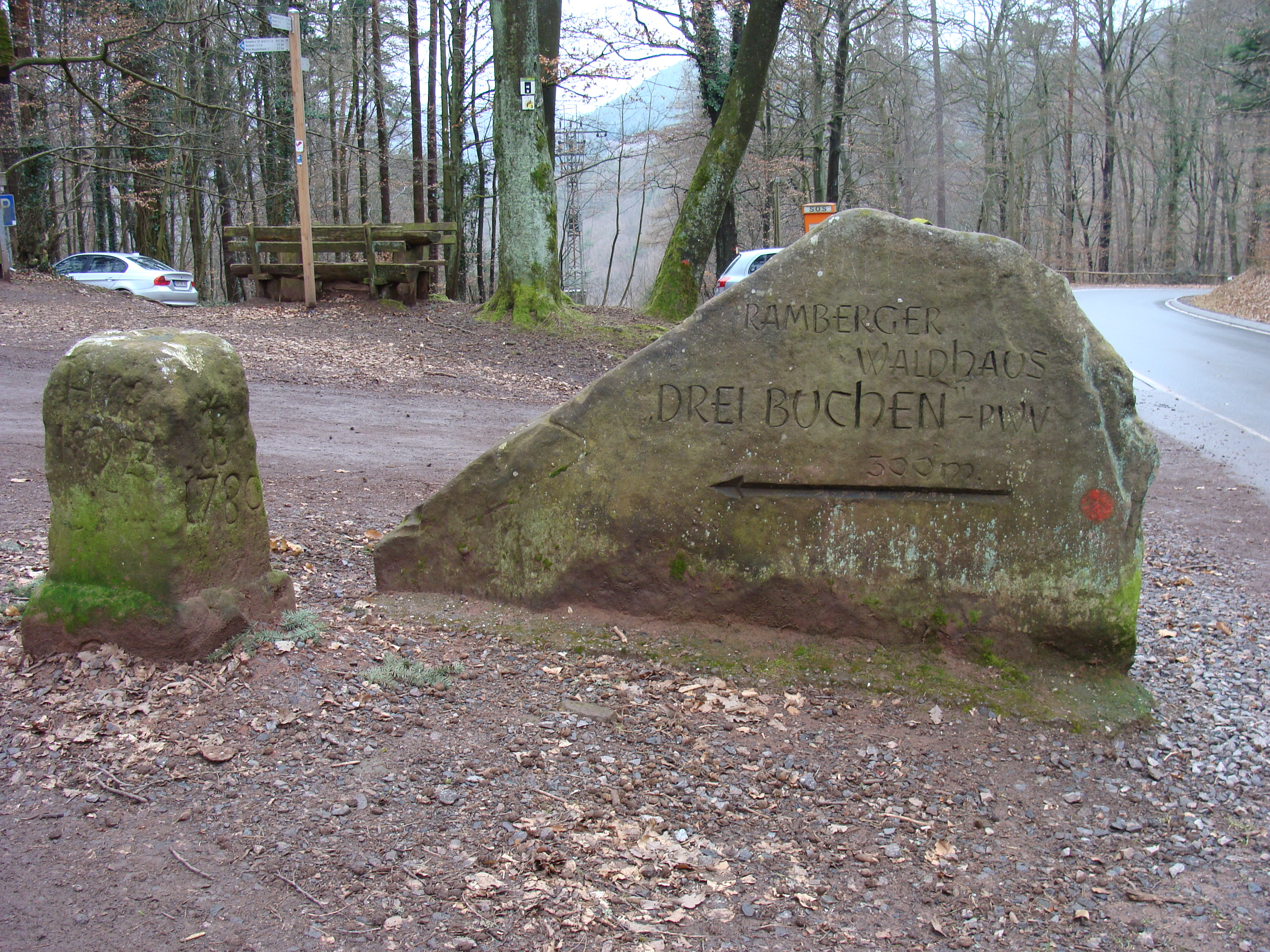 Ritterstein 234 Drei Buchen bei Ramberg im Pfälzerwald